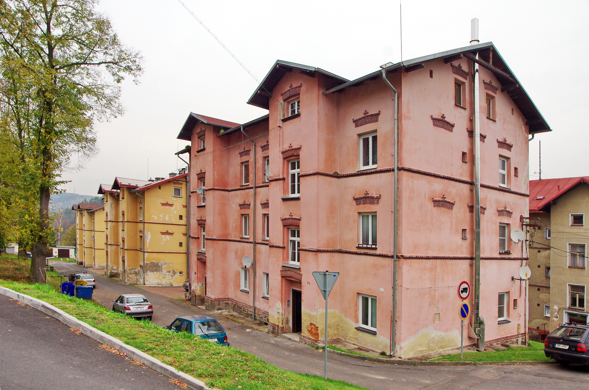 Libavské Údolí, okres Sokolov